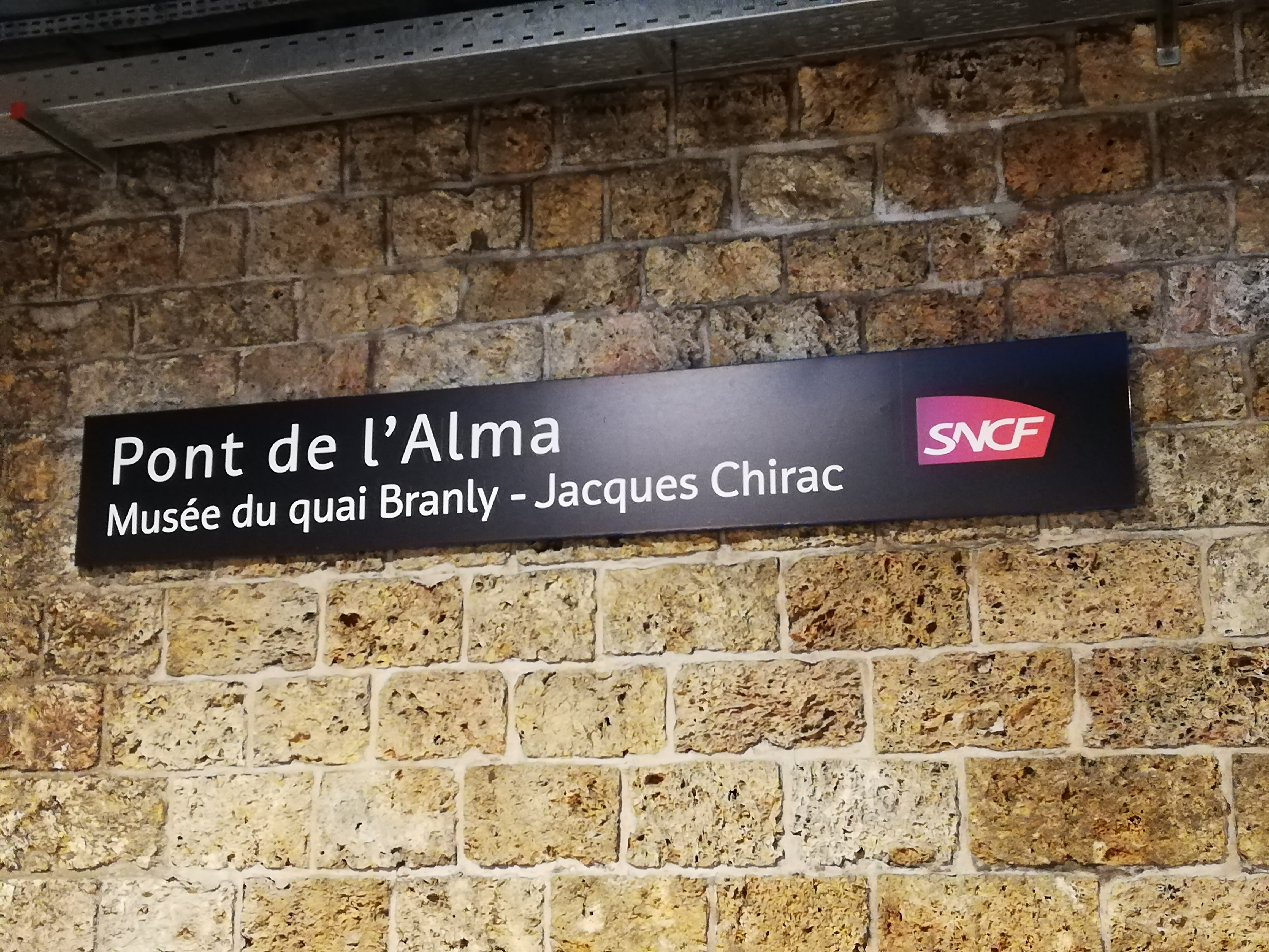 Plaque signalétique de la gare du Pont de l'Alma - Musée du quai Branly – Jacques Chirac, après sa réouverture, en septembre 2019.